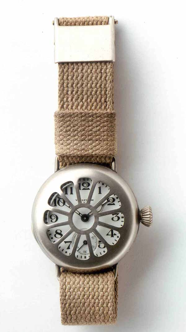 Schuetzengrabenarmbanduhr, Waltham, USA, um 1914 (Deutsches Uhrenmuseum, Inv. 47-3352)